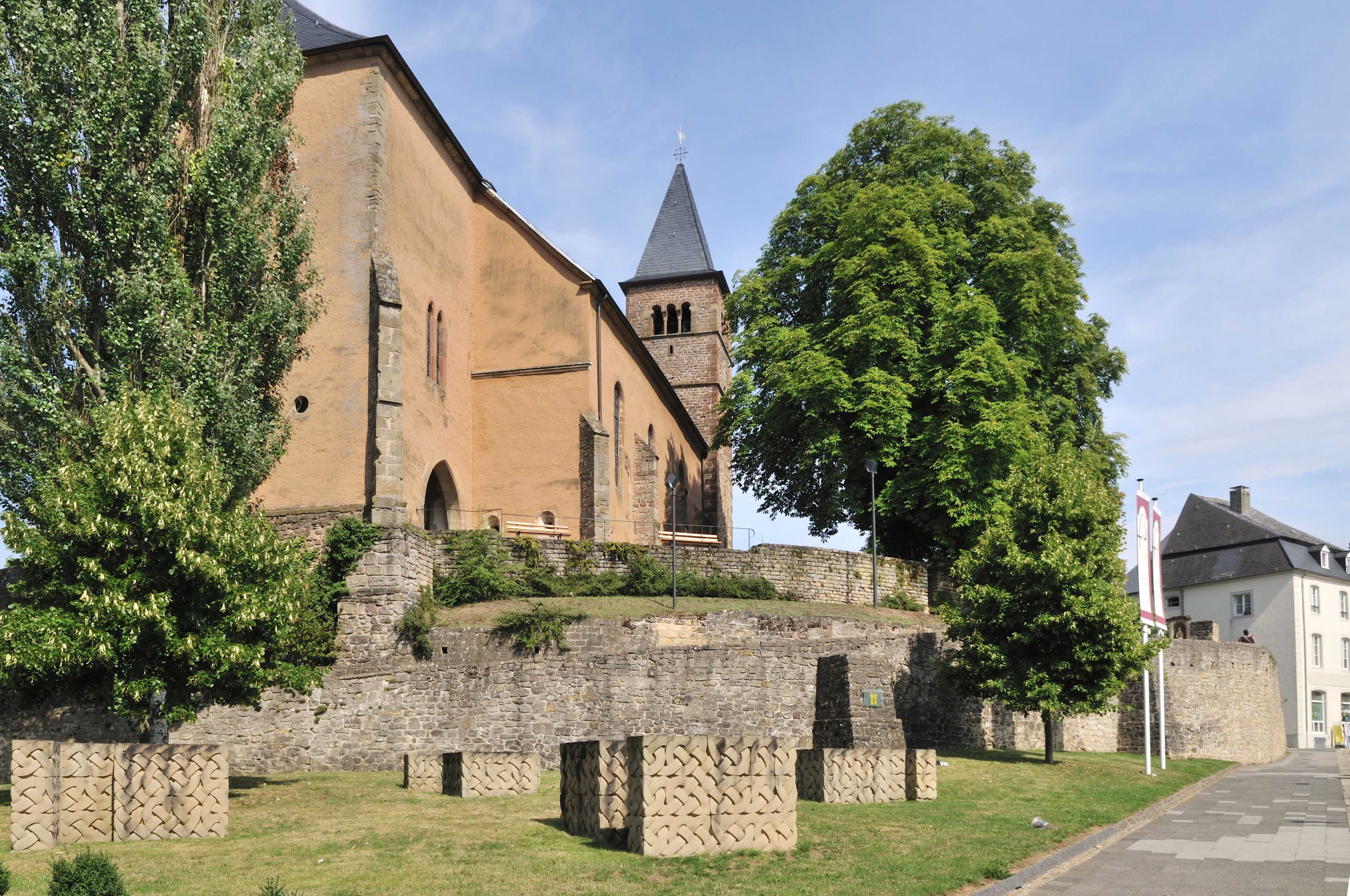 De Käschtebam um Hiwwel bei der aler Porkierch. Kategorie:Gemeng Iechternach